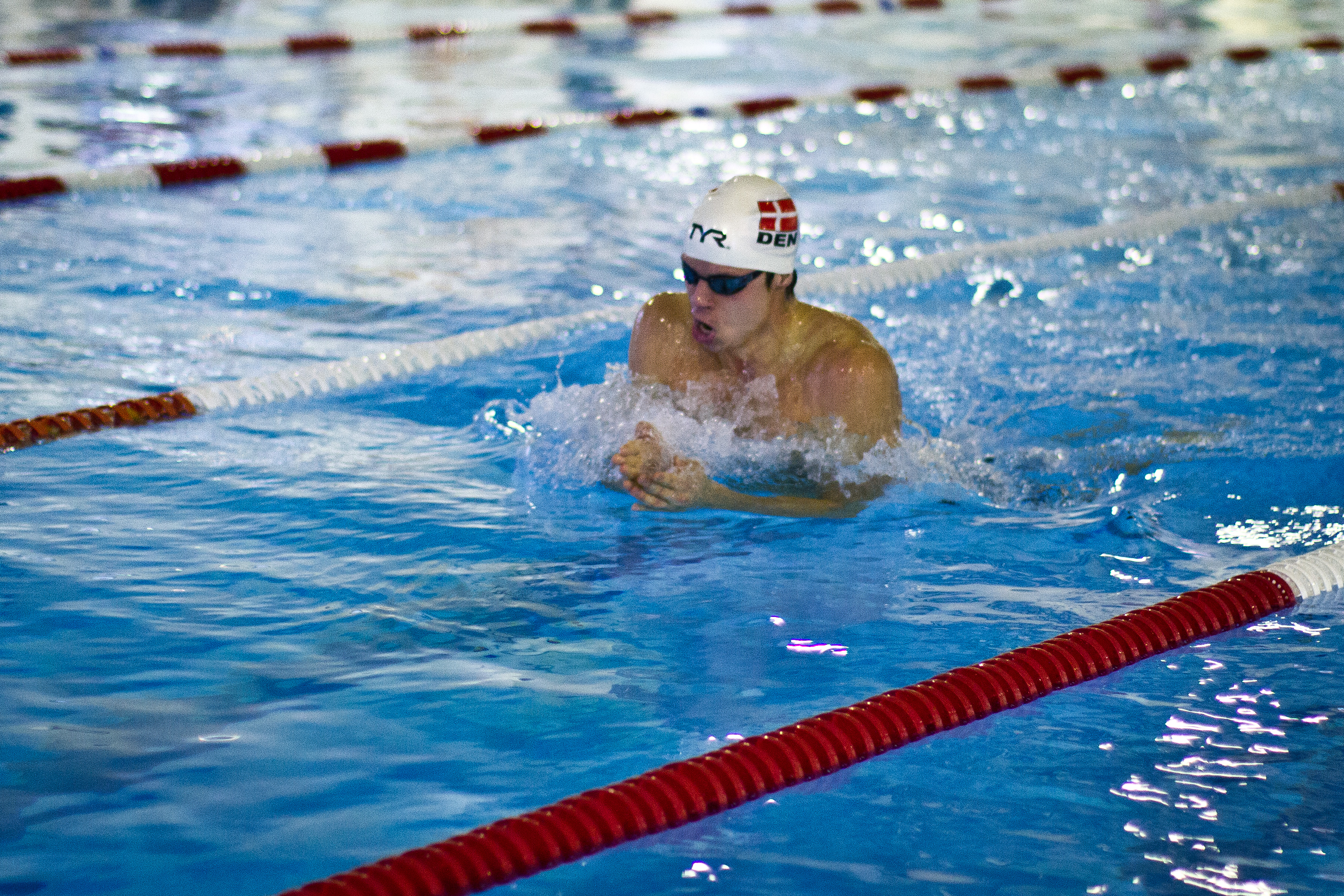 Chris Christensen er en dansk elitesvømmer, født i 1988.